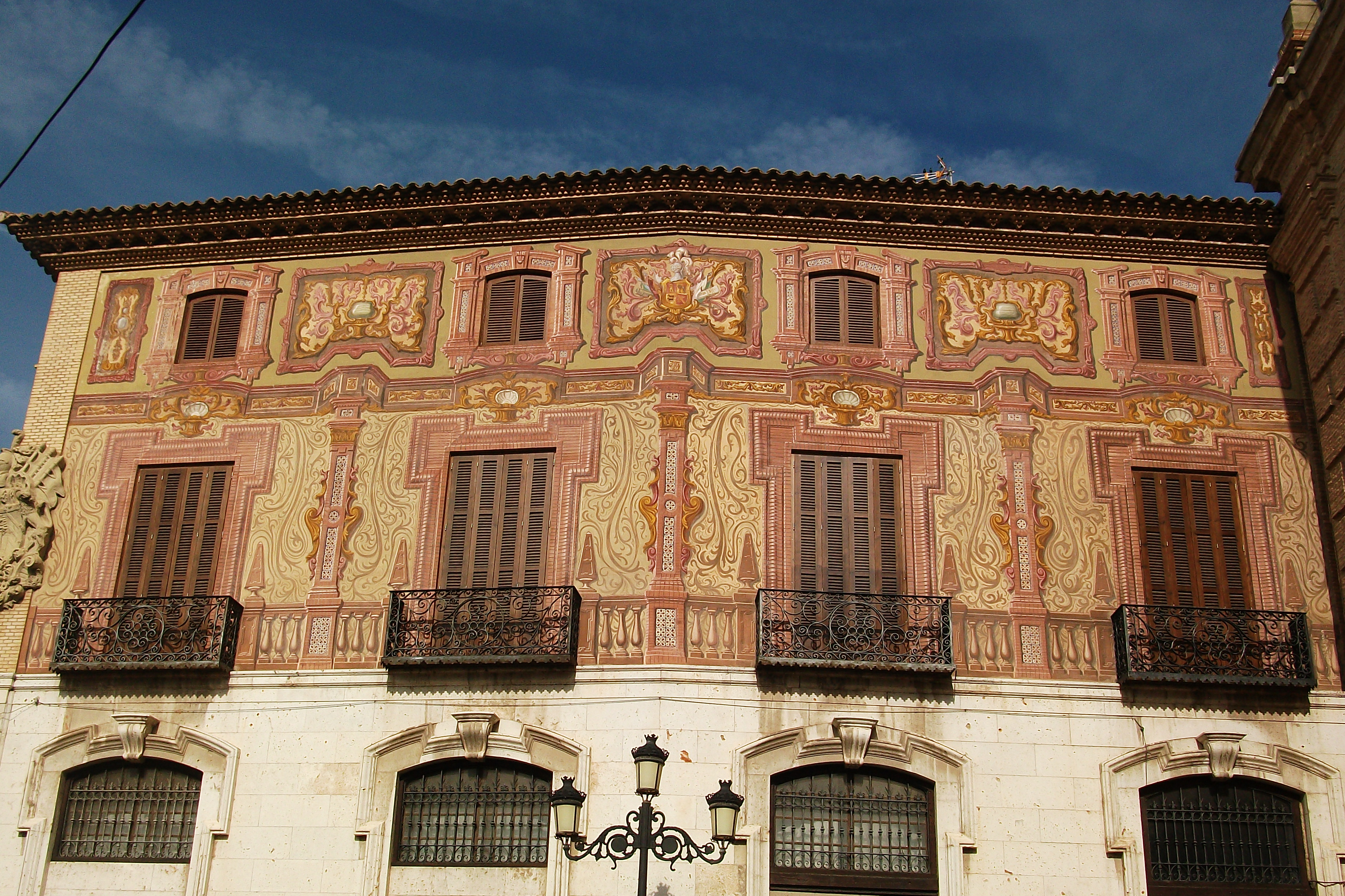 Corella. Imagen del pueblo. Noviembre de 2011